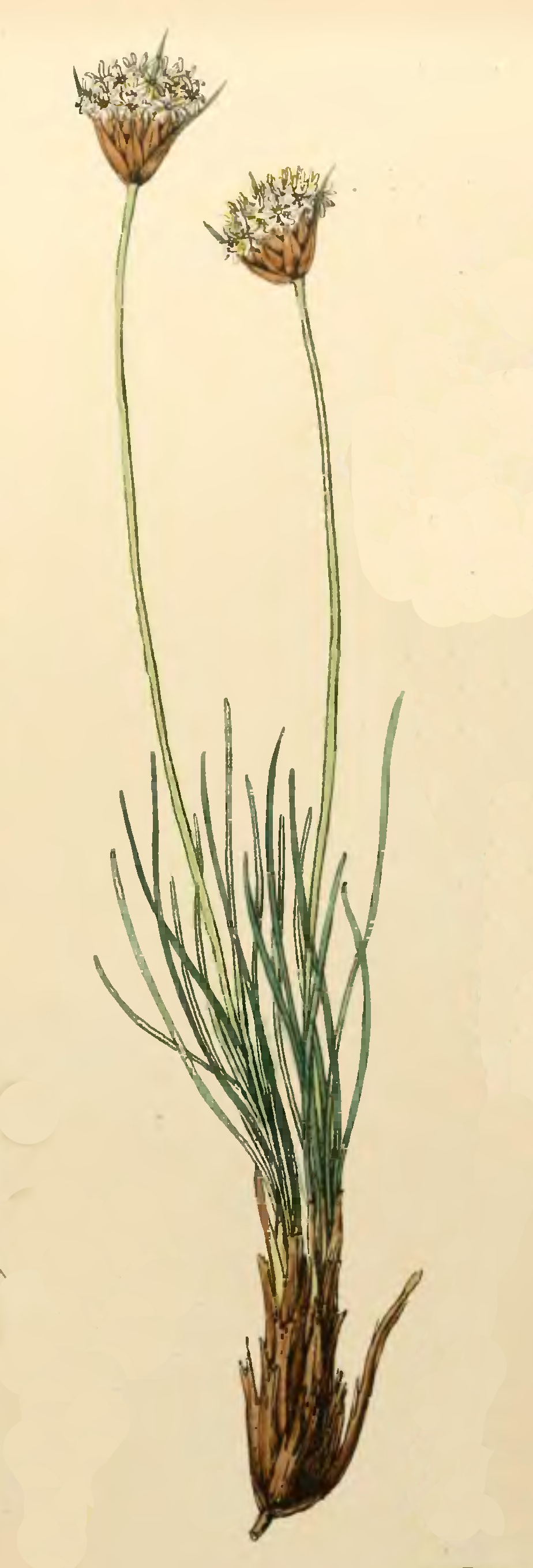 Borya scirpoidea